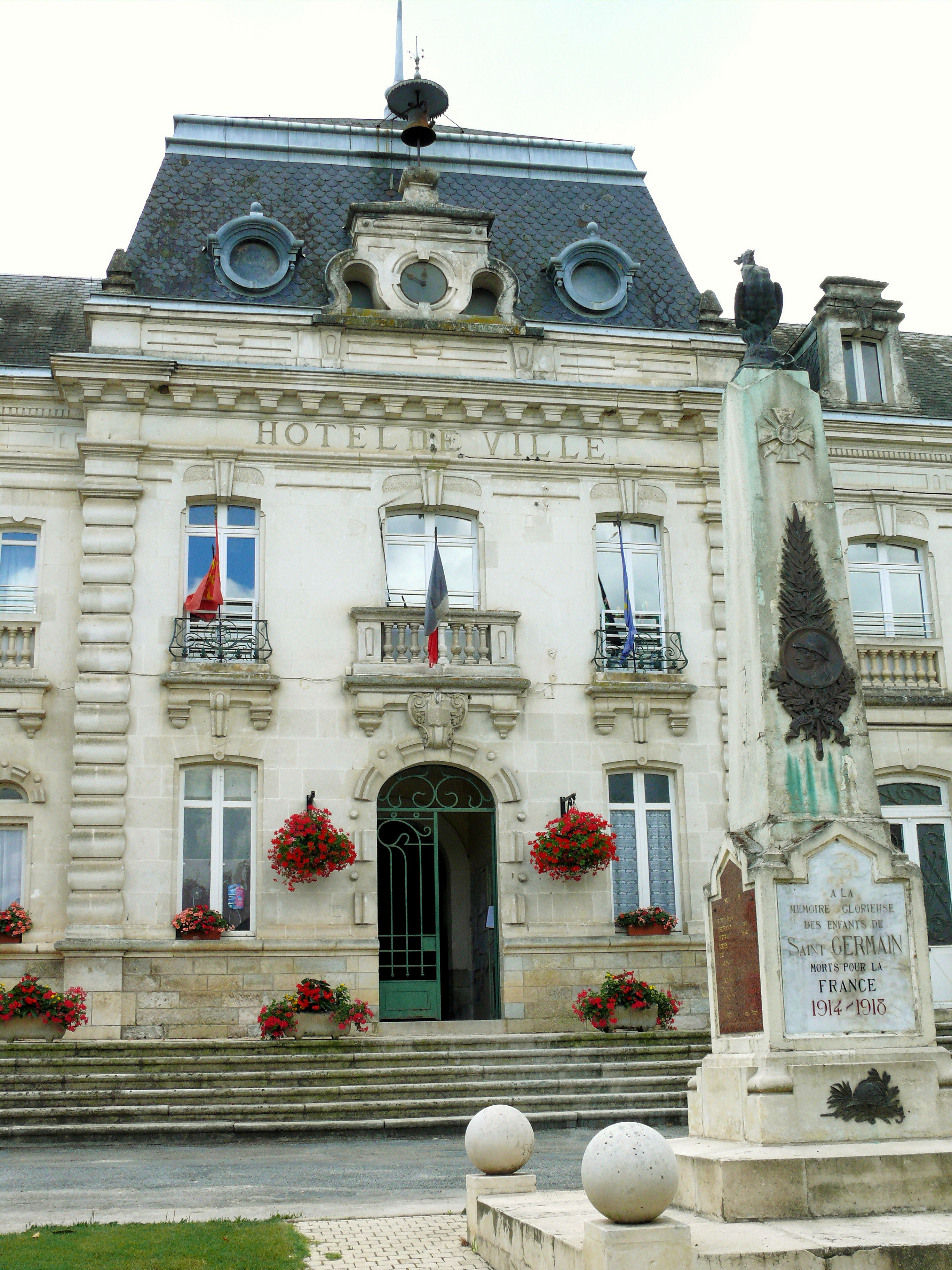 Saint-Germain-du-Bel-Air - Hôtel de ville et monument aux morts